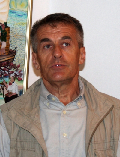 Josip Jurčević u Zagrebu na izložbi Željka Božića